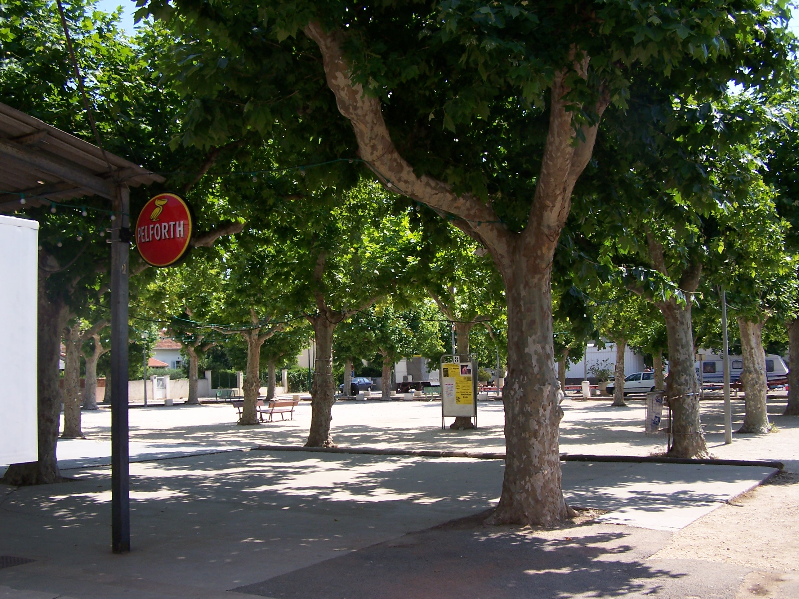 Vue de la place François Belot, les Bormettes